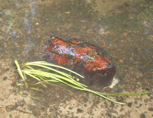 krasnorost słodkowodny Hildenbrandia rivularis, rzeka Kirsna, Obszar natura 2000 Swajnie